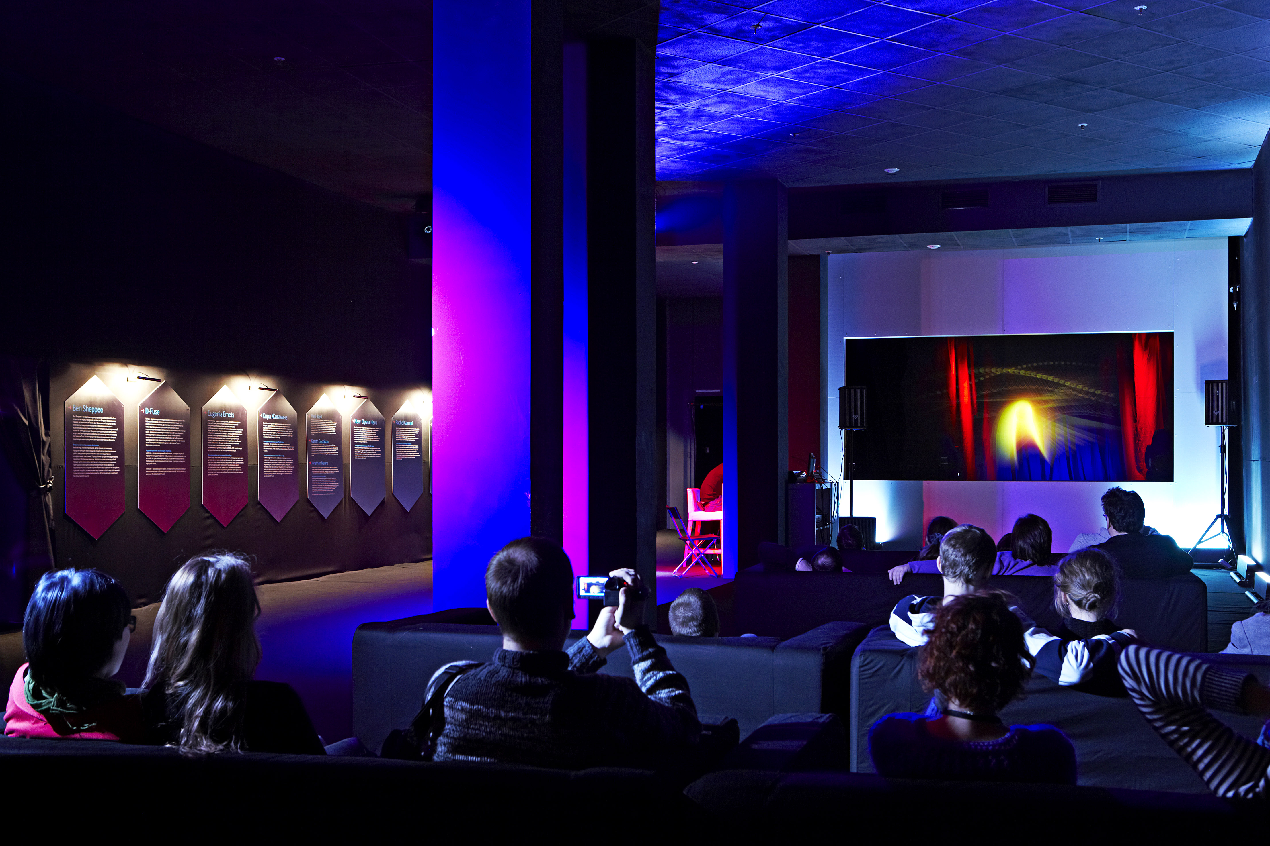 Yota Space 2010. Зал Musion